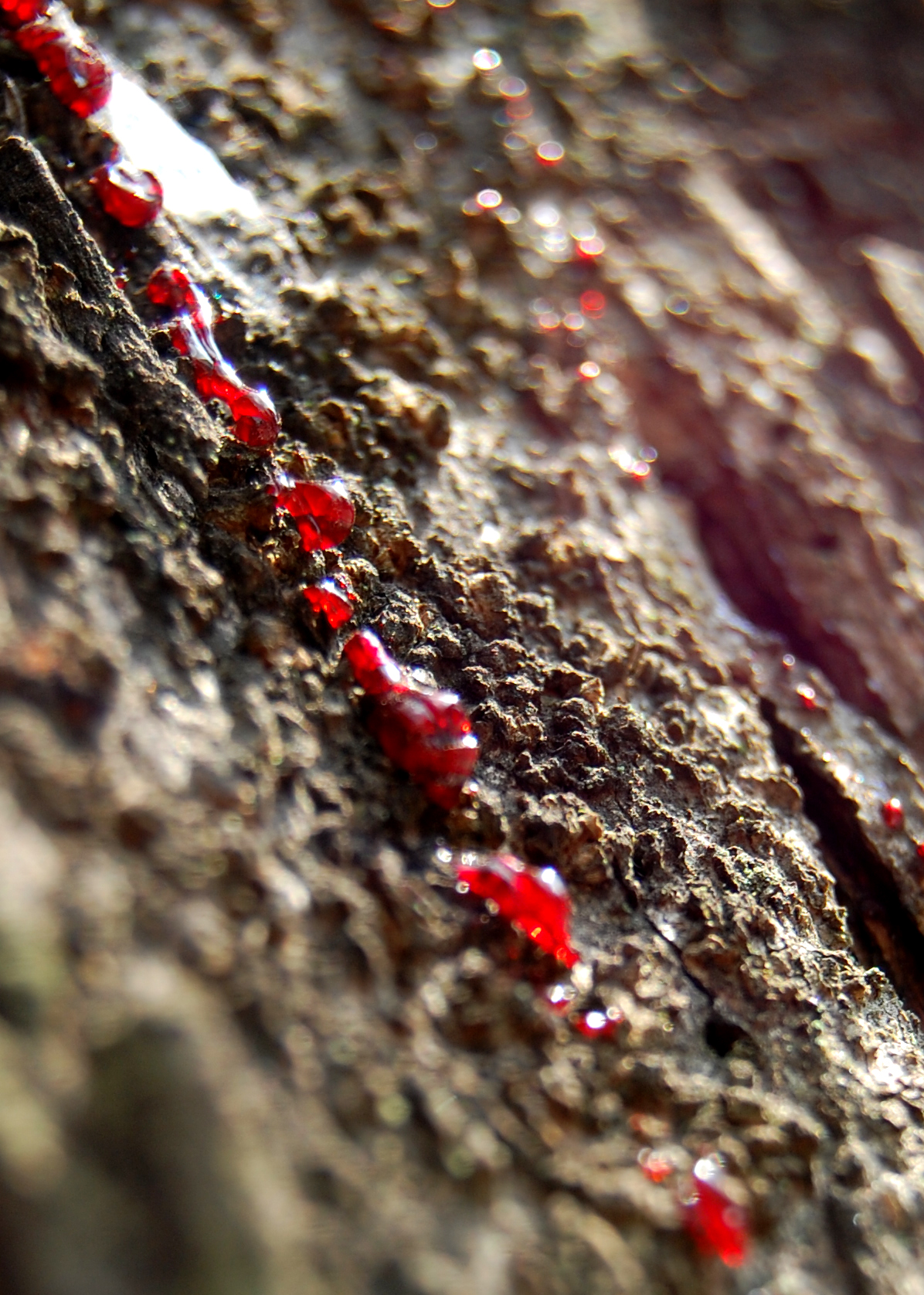 Getah adalah istilah umum untuk menyebut cairan kental yang keluar dari tubuh, baik tumbuhan maupun hewan. Namun demikian, penggunaan getah pada hewan terbatas, yaitu untuk menyebut cairan limfa (getah bening).